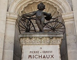 Partie supérieure du monument dédié à Pierre et Ernest Michaux, inventeurs du vélocipède à pédales.